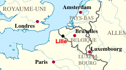 Position de Lille en Europe du Nord